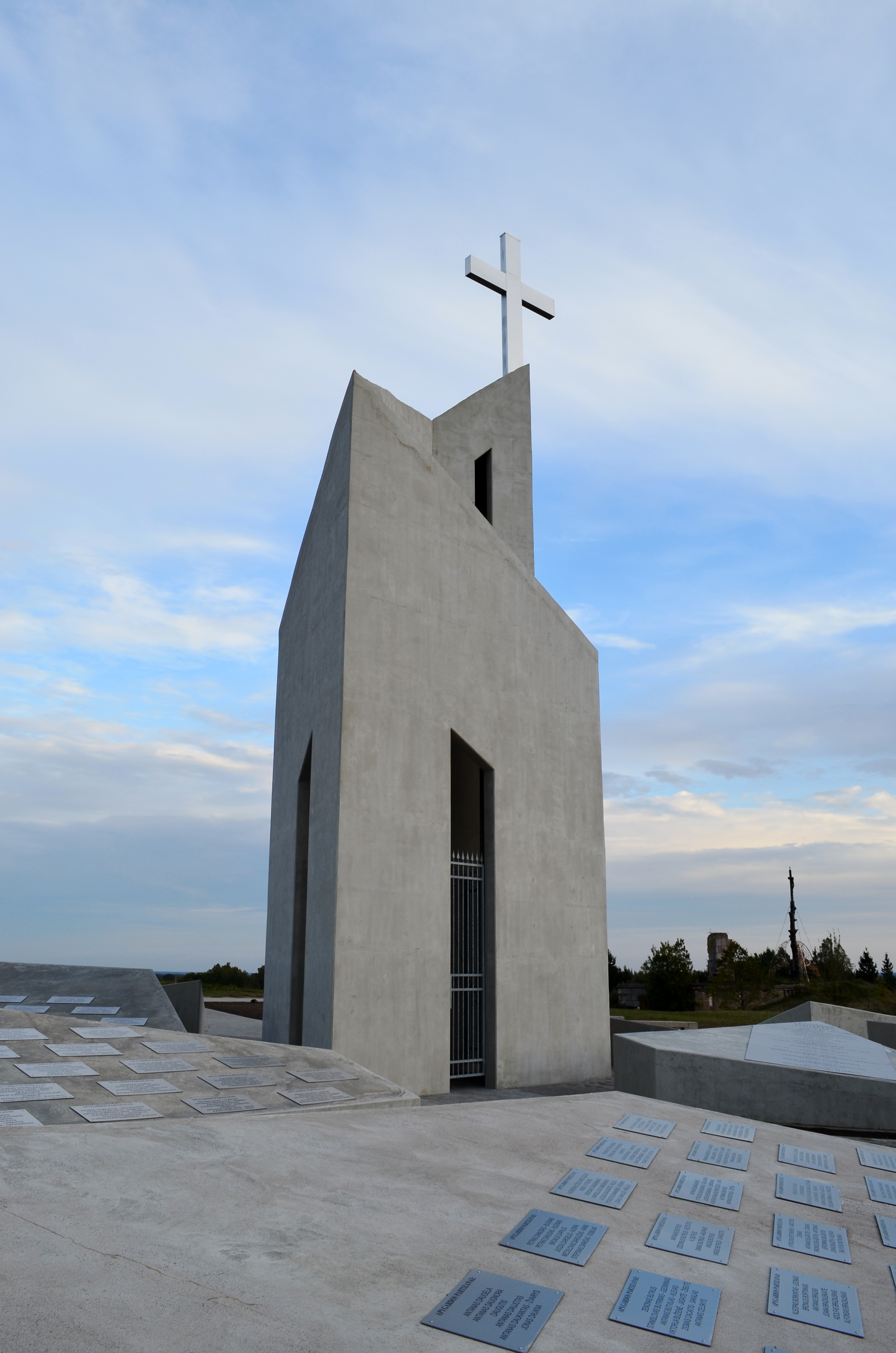 Kryžkalnio koplyčia, Raseinių raj.